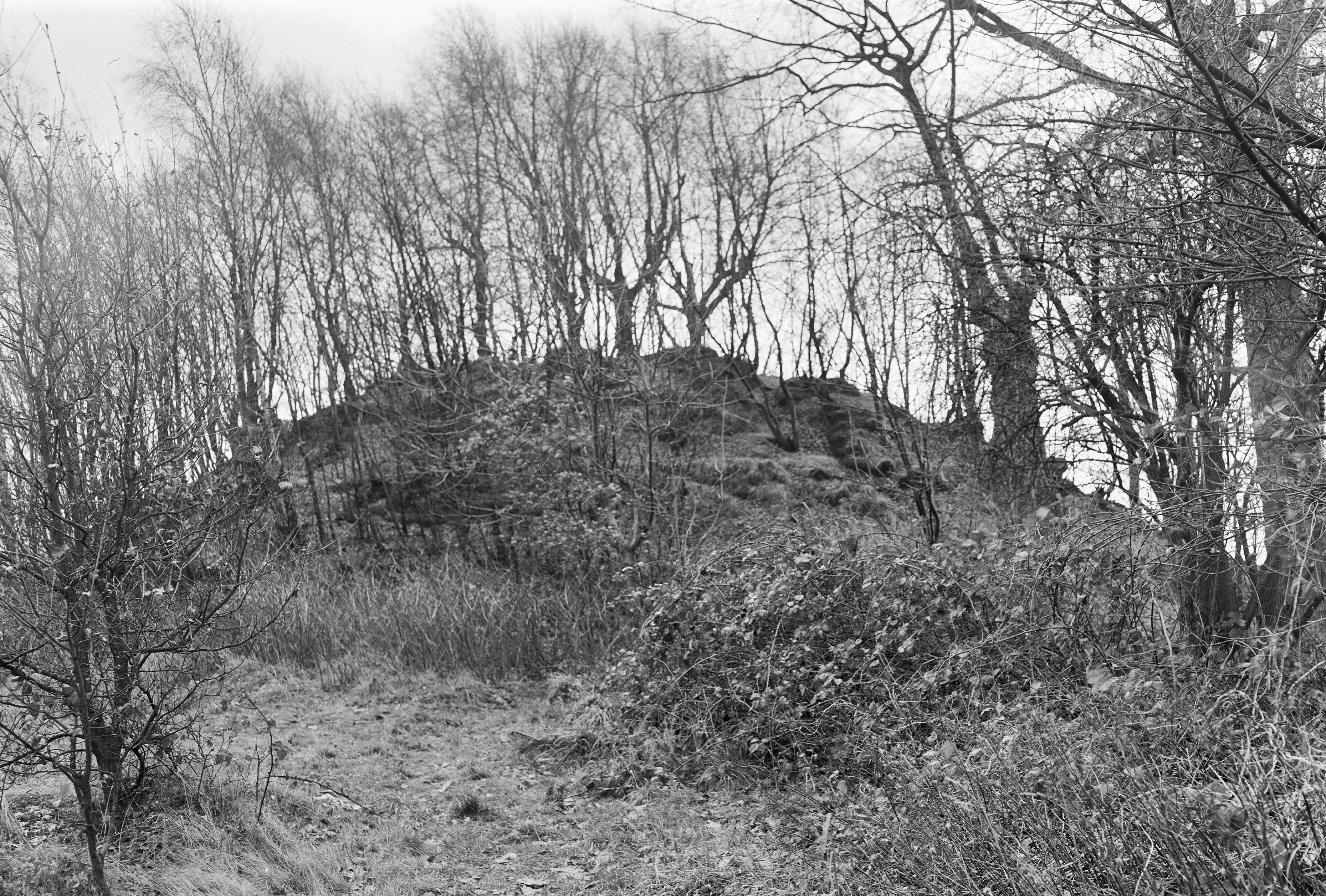 de Kapellenberg, aanzicht